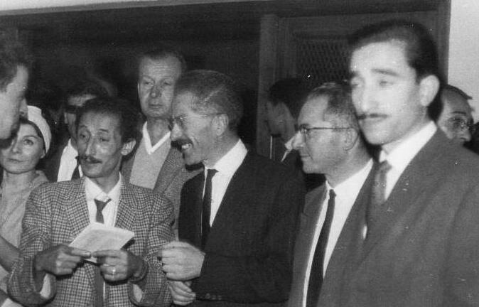 Kaddour M'Hamsadji au salon du livre d'Alger 1962